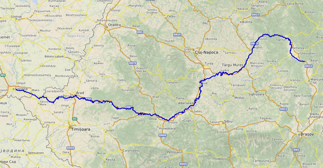 carte réalisée sur umap This map may be incomplete, and may contain errors. Don't rely solely on it for navigation.